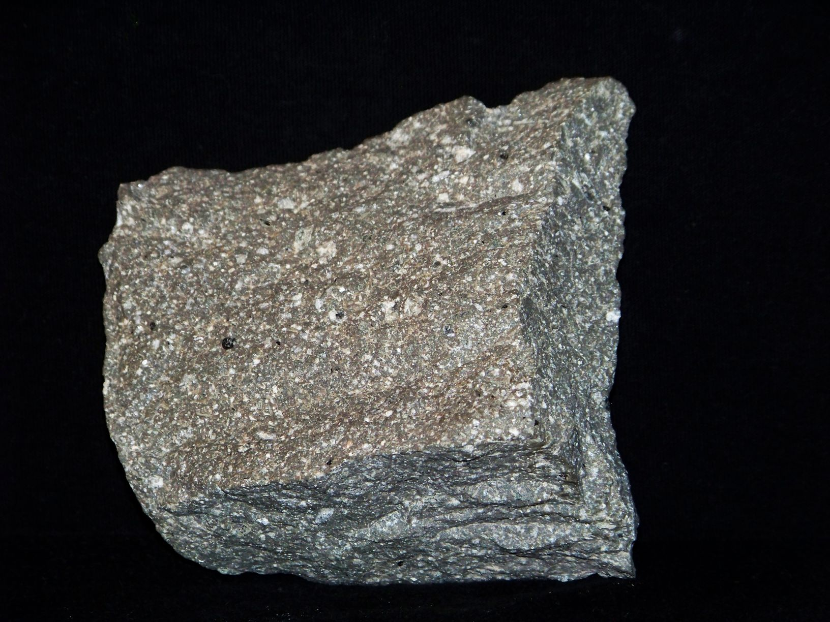 Porfir kwarcowy (ryolitowy), k. Zalas, okolice Krakowa,Polska